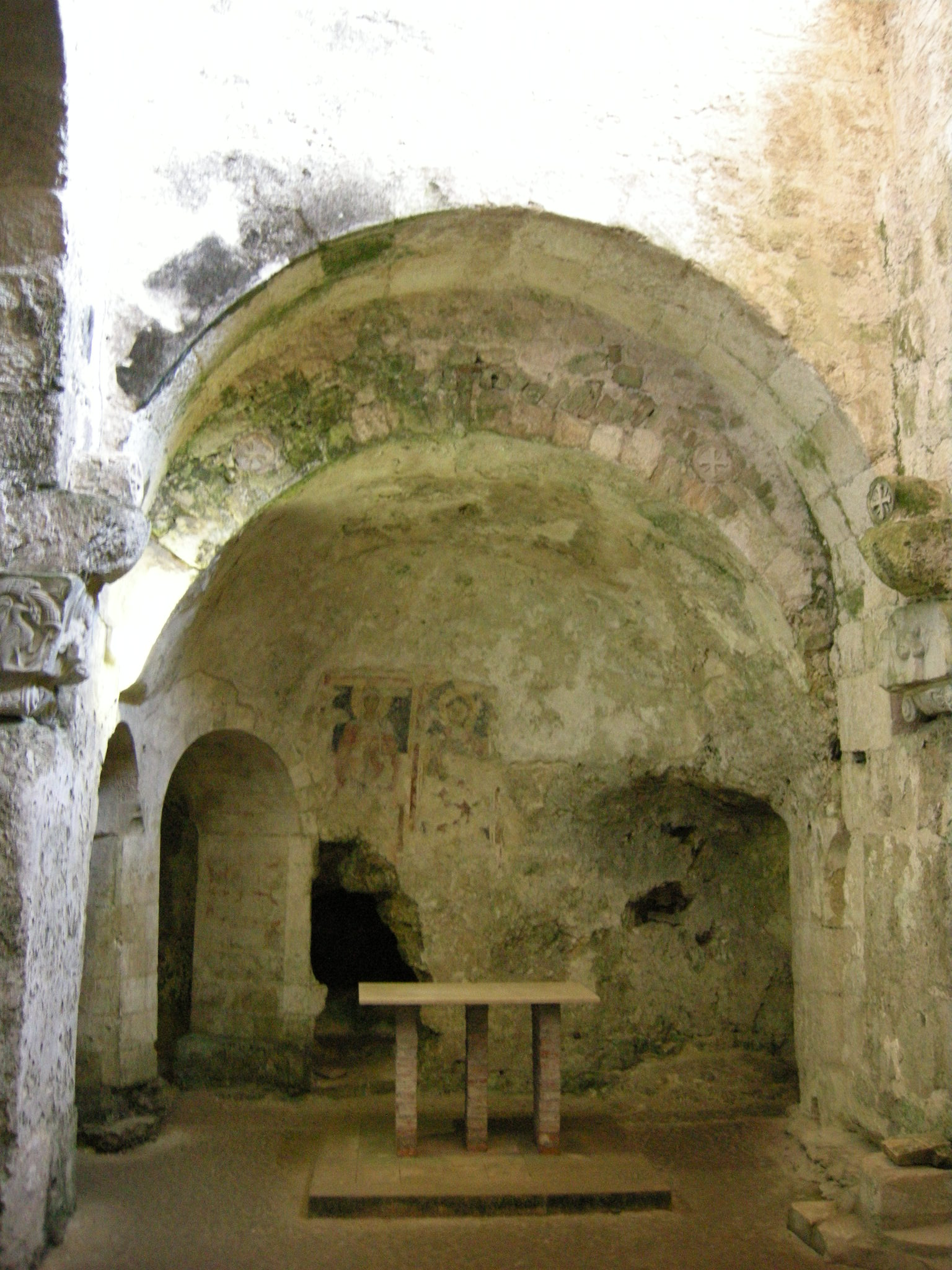 Siracusa, neapolis, cripta di san marciano